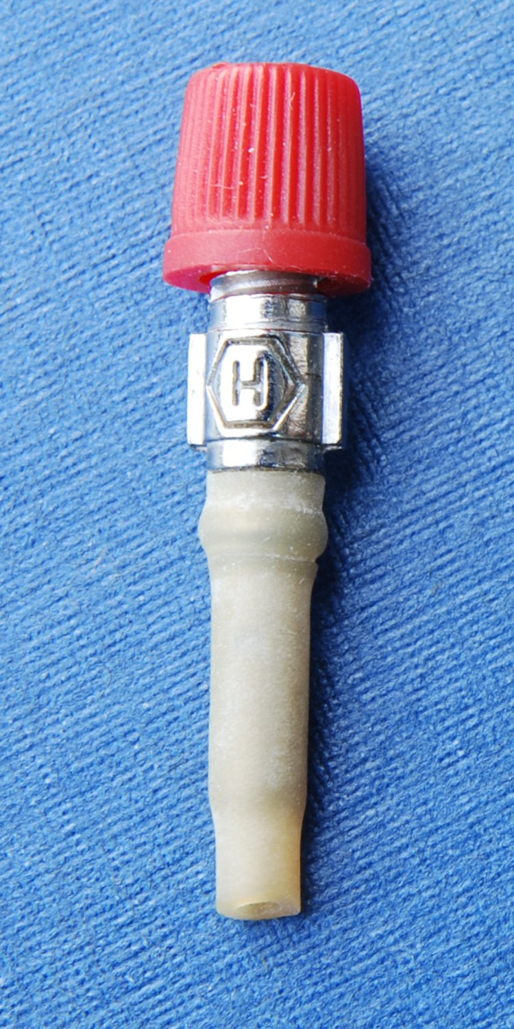 Schlauchventil